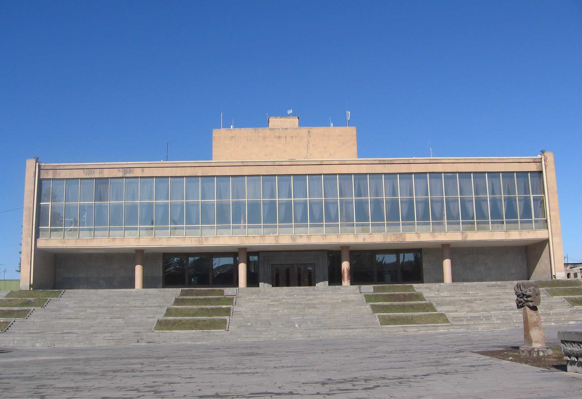 Théâtre de Gumri au nom de V. Achemian